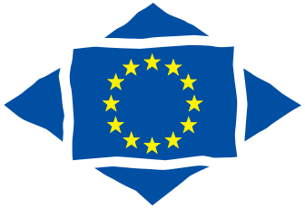 Logo del Comité de las Regiones de la UE.